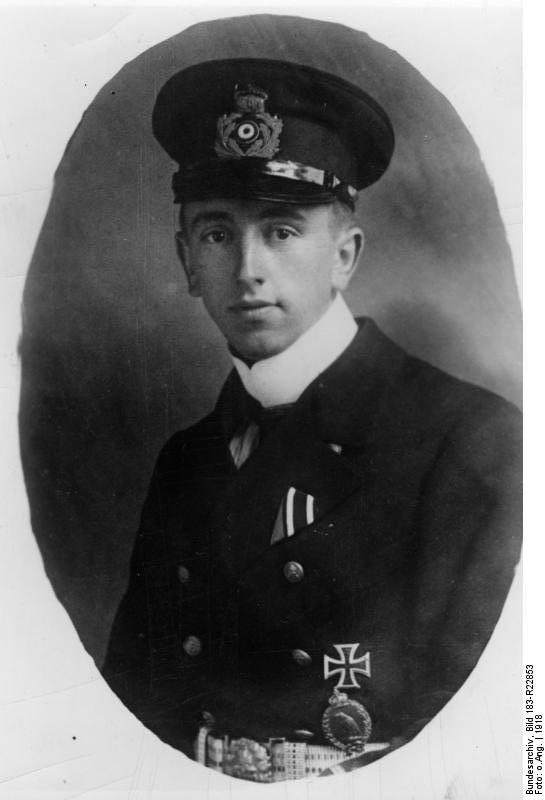 Theodor Osterkamp Marineflieger Theo Osterkamp (Porträt) 6637-18 Abgebildete Personen: Osterkamp, Theodor: Generalmajor, Ritterkreuz (RK), Luftwaffe, Orden Pour le mérite, Deutschland (GND 124745822)